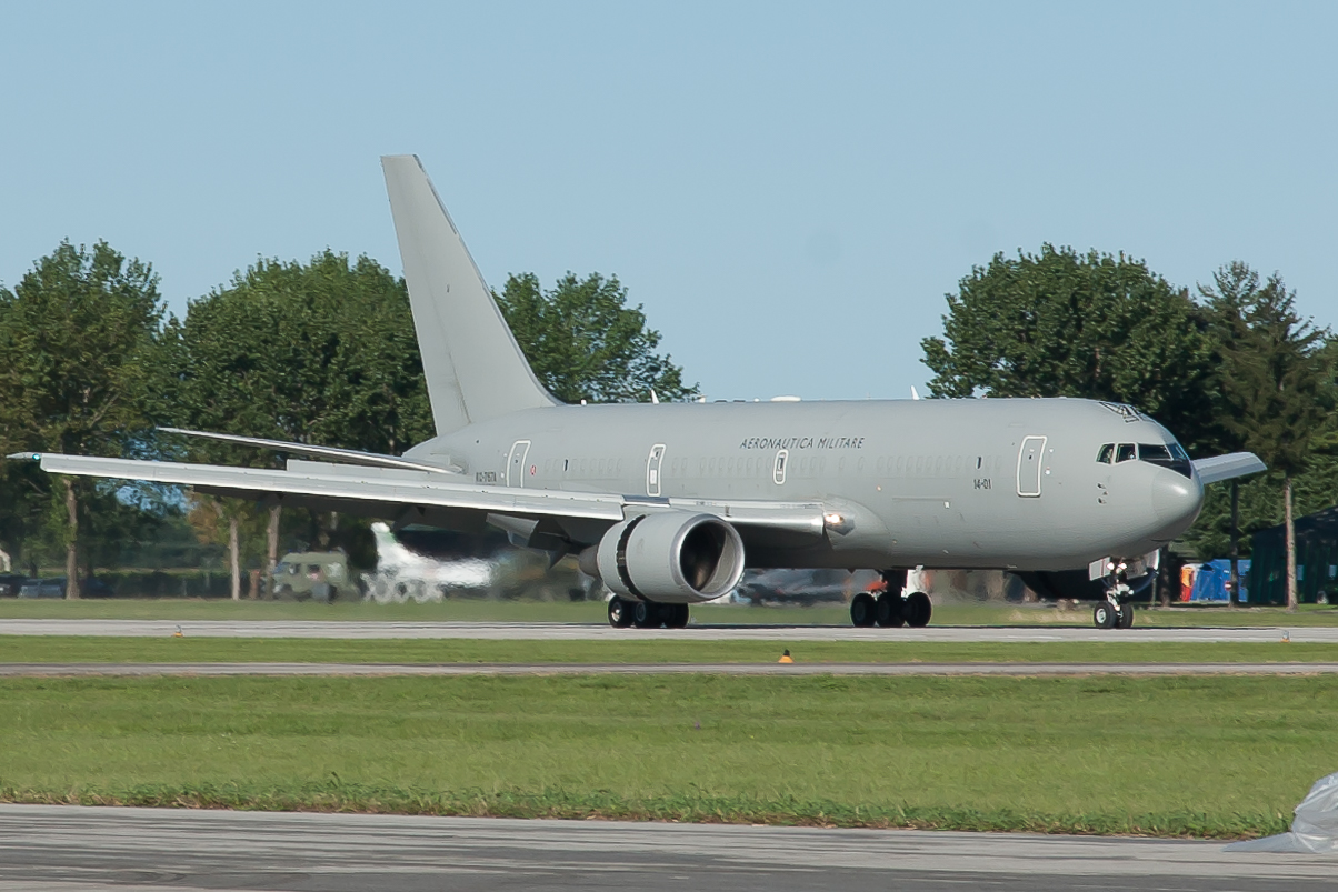 Boeing KC-767A (767-2EY/ER) MM62226 14-01 landing